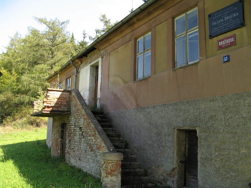 Rodinný dům Václava Brožíka, Brožíkova 57, Třemošná.